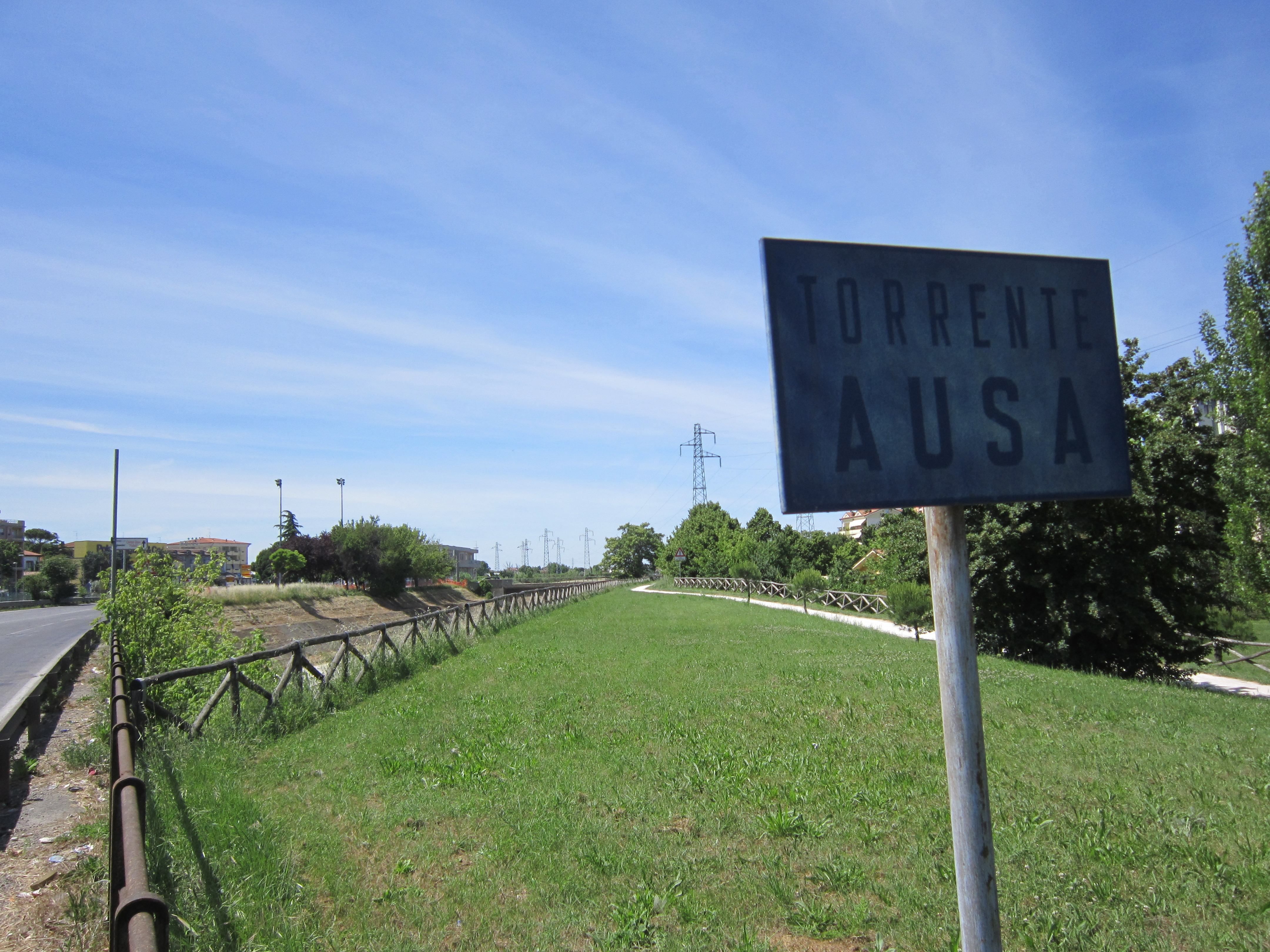 Indicazione del torrente Ausa a Rimini nei pressi della Circonvallazione Nuova (nonché strada statale 16 Adriatica).